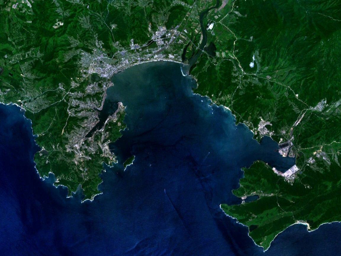 Nakhodka Bay, satelite view